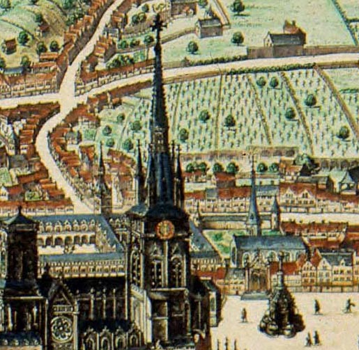 extrait de la carte de Joan Blaeu